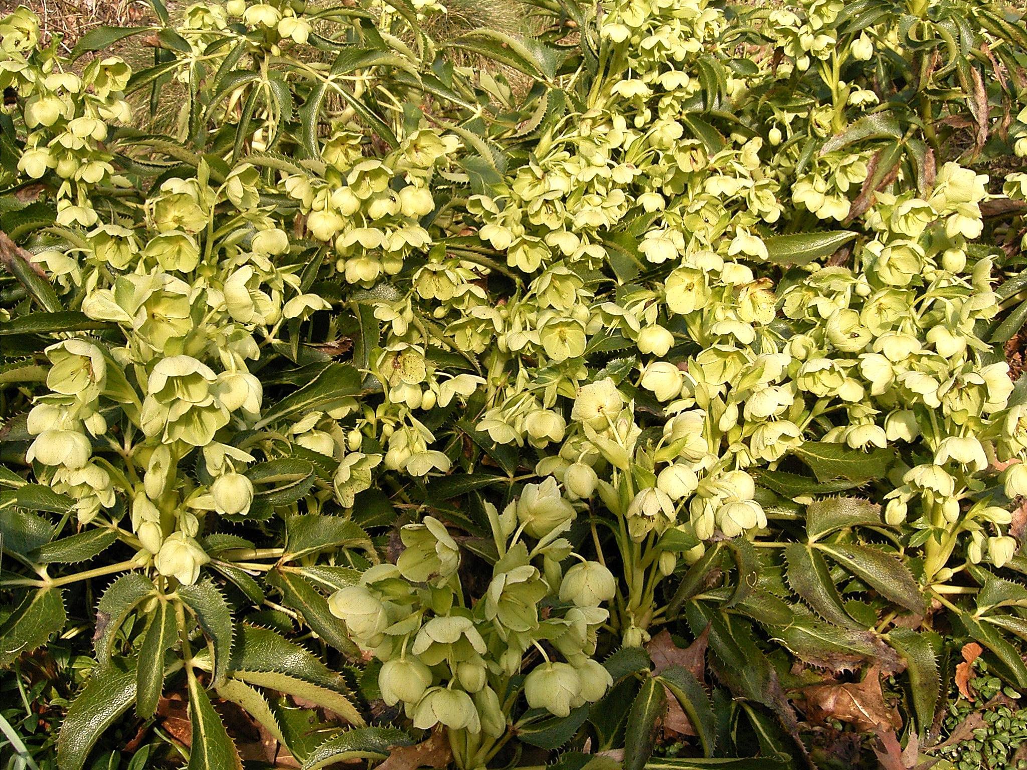 Helleborus argutifolius